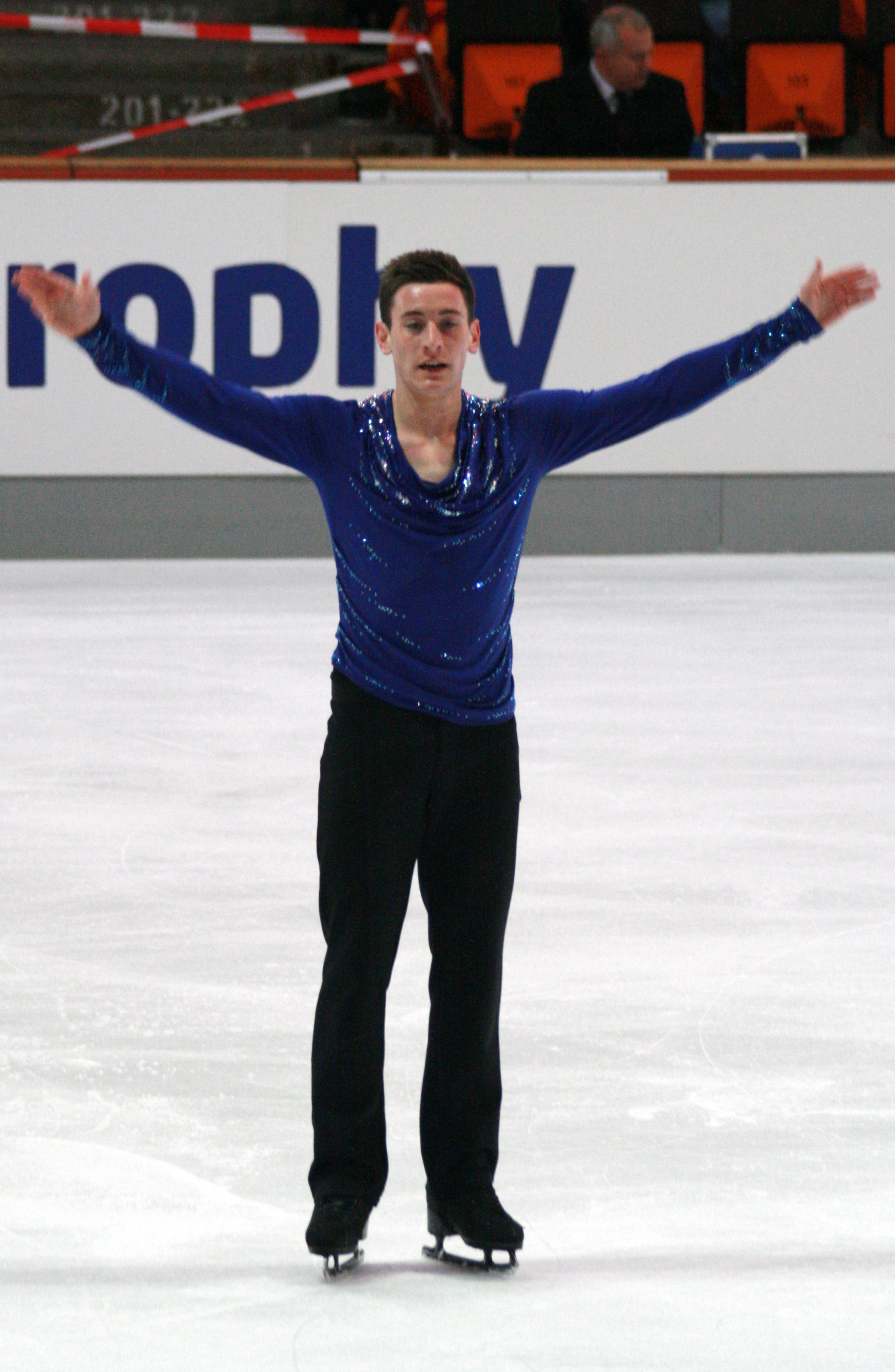 Метью Парр (Великобритания) на 2013 Nebelhorn Trophy